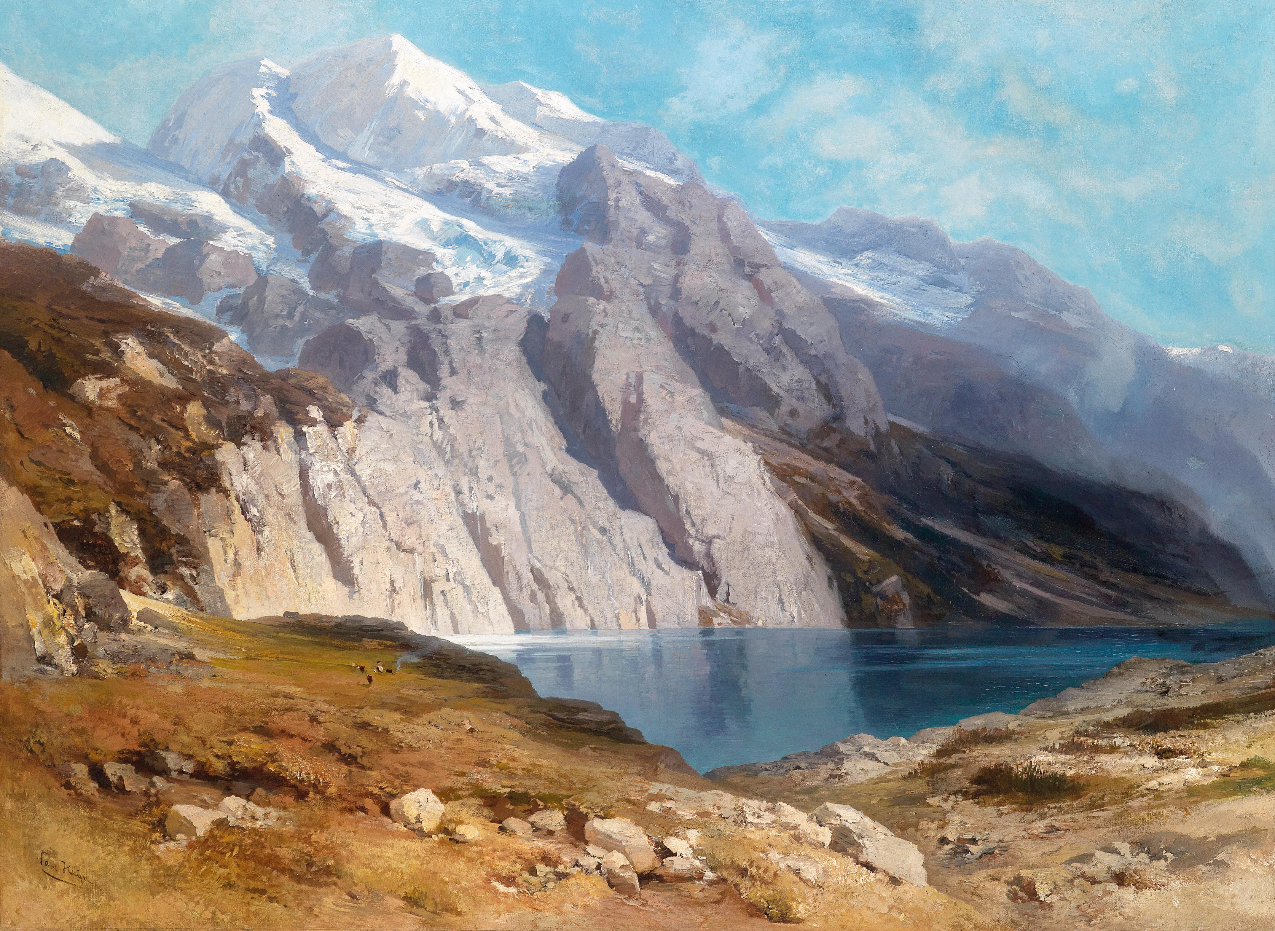 Blick auf das Doldenhorn mit Oeschinensee Laut rückseitiger alter Bezeichnung, signiert Carl Heyn, Öl auf Leinwand, 111 x 150 cm